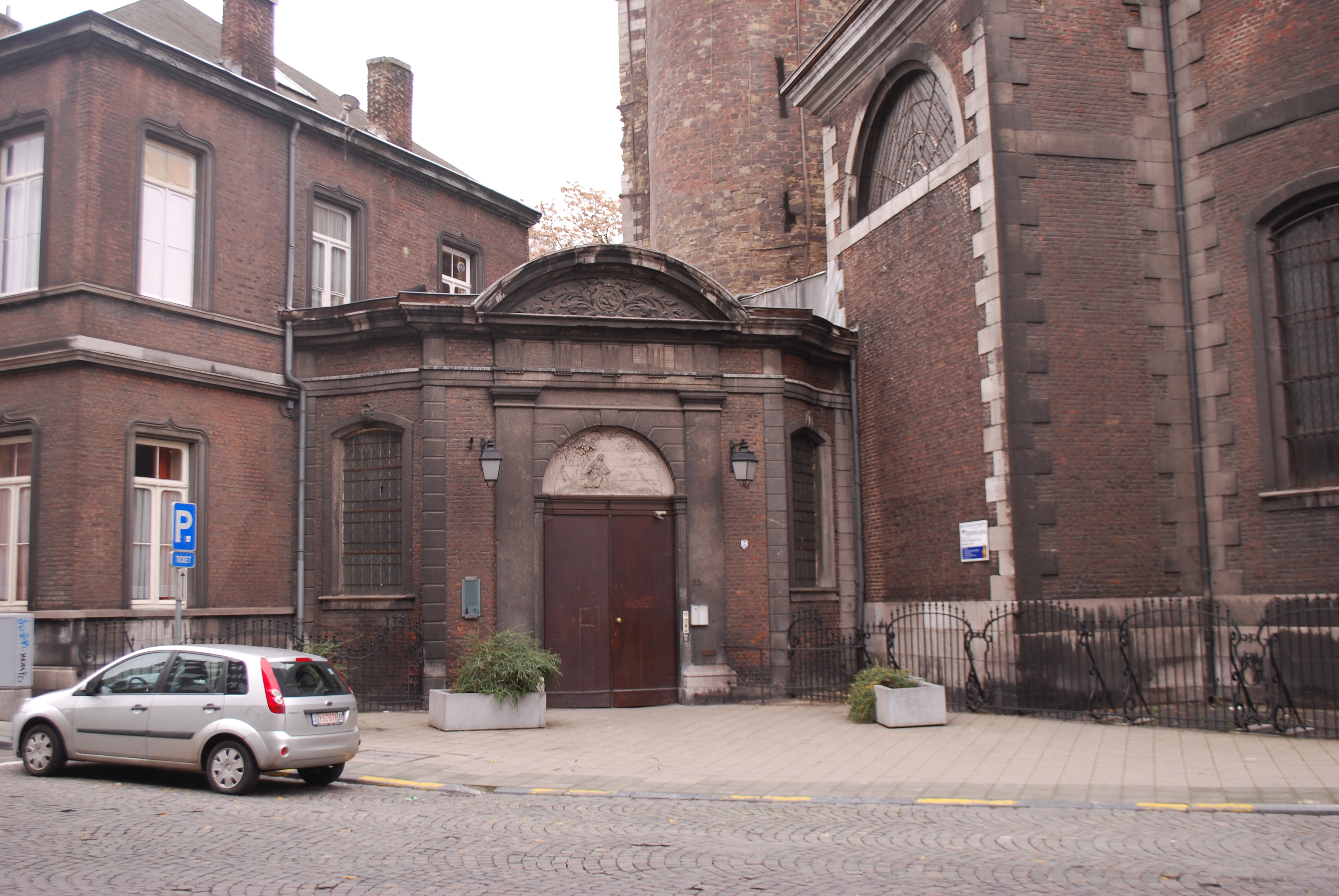 L'ancienne collégiale Saint-Jean, à Liège.